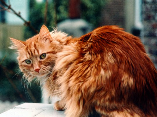 chat au poil mi-long